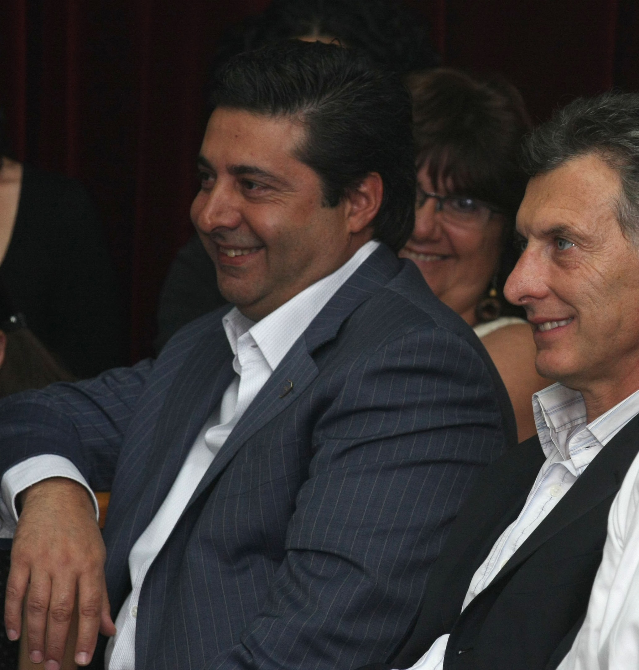 Vte Lopez. Diciembre 12 de 2011. El jefe de Gobierno de la Ciudad de Buenos Aires, Mauricio Macri, asistió hoy a la jura del electo intendente de Vicente López, Jorge Macri, junto al ministro de Educación porteño, Esteban Bullrich, y el presidente del Club Boca Juniors, Daniel Angelici. Foto Matías Repetto Bonpland-gv/GCBA.